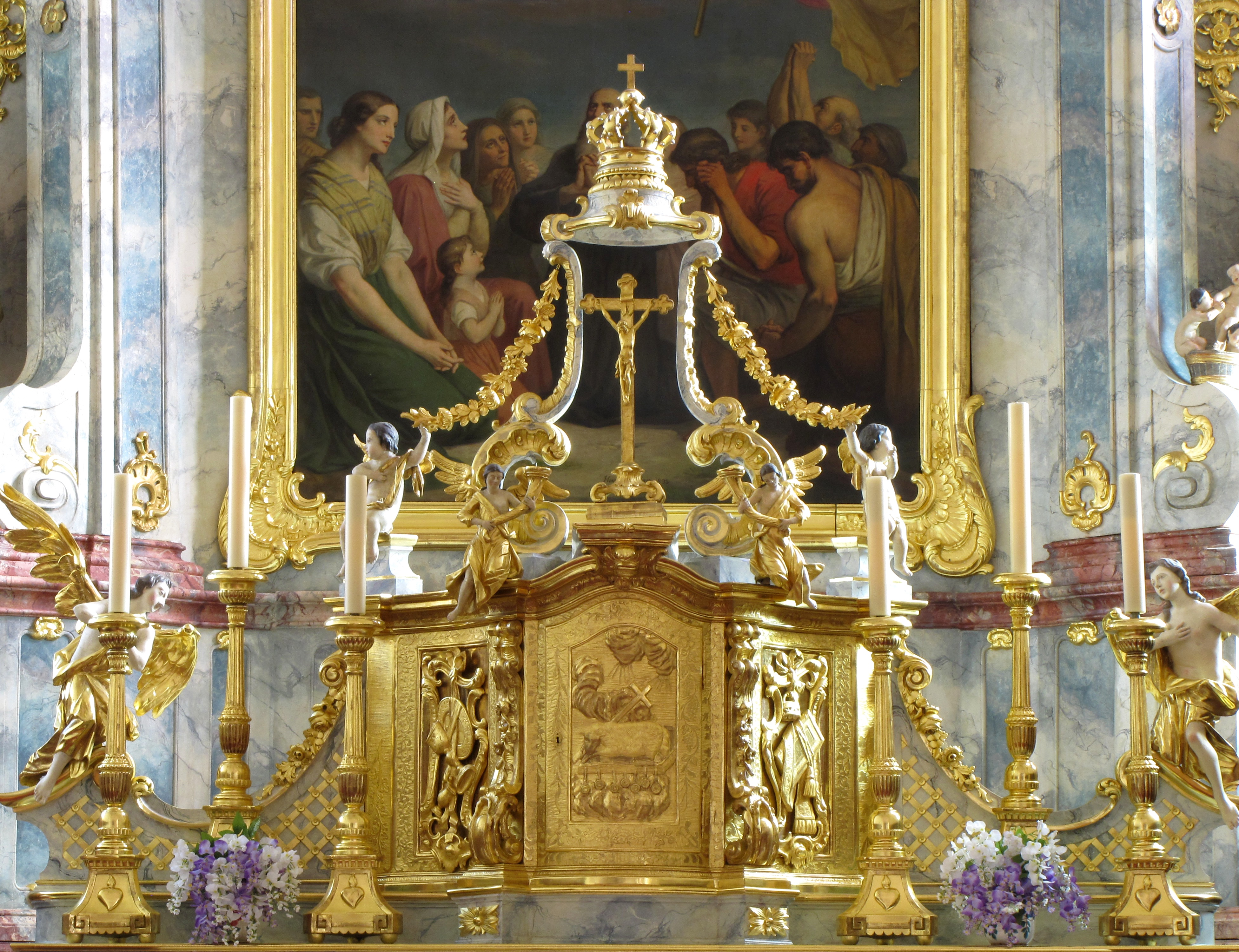 Alsace, Bas-Rhin, Église Saint-Martin d'Ebersheim (PA00084700, IA00124467). Tabernacle du maître-autel (XVIIIe-XIXe) et partie inférieure du tableau "Glorification de St-Martin" (Unknown, huile sur toile, 1893): This object is classé Monument Historique in the base Palissy, database of the French furniture patrimony of the French ministry of culture, under the references PM67000540 and IM67006605.